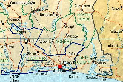 source : œuvre personnelle, rélisée à prtir de Image:Côte d'Ivoire Map.jpg.